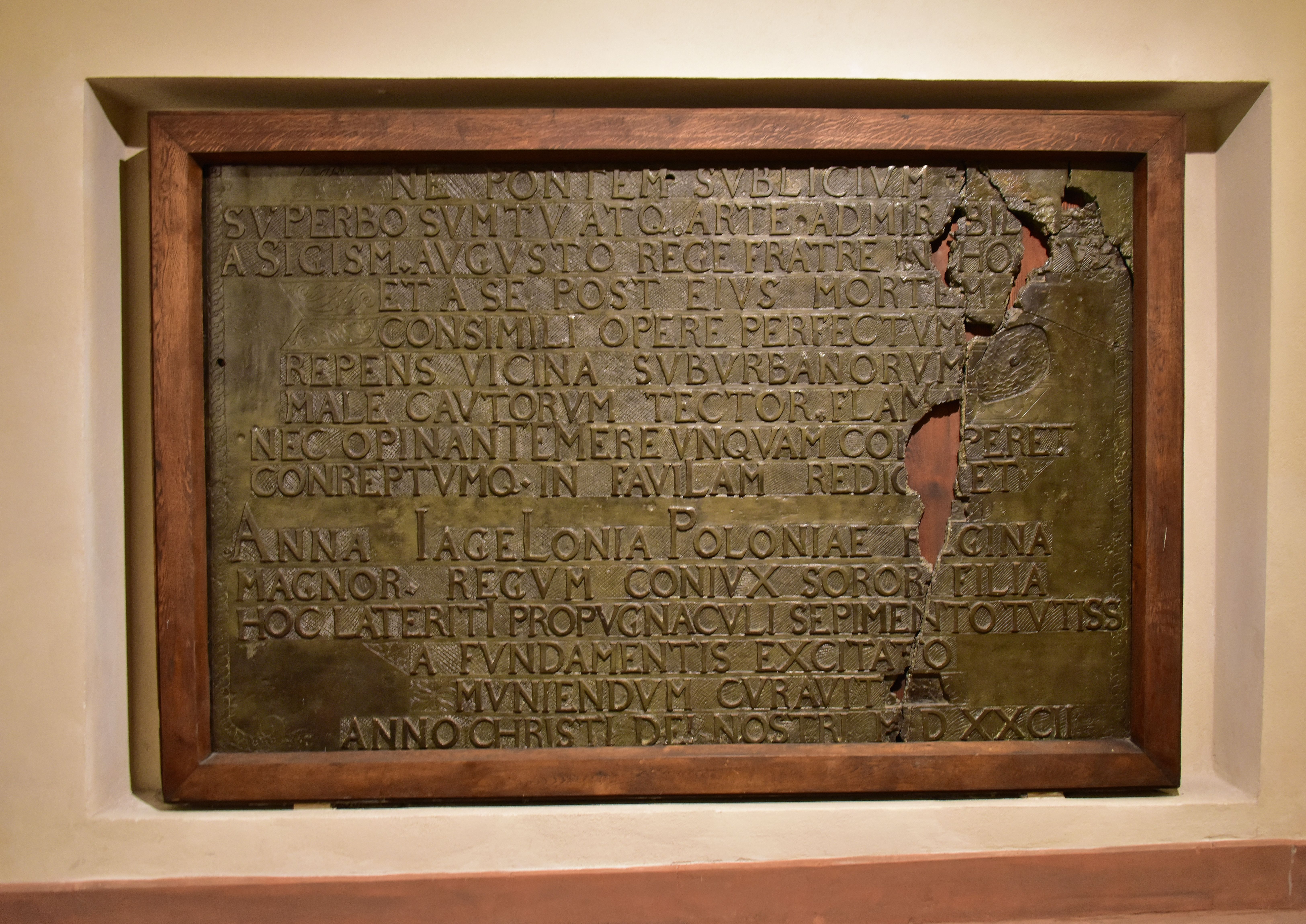 Tablica pochodząca z baszty Mostowej eksponowana w Muzeum Warszawy